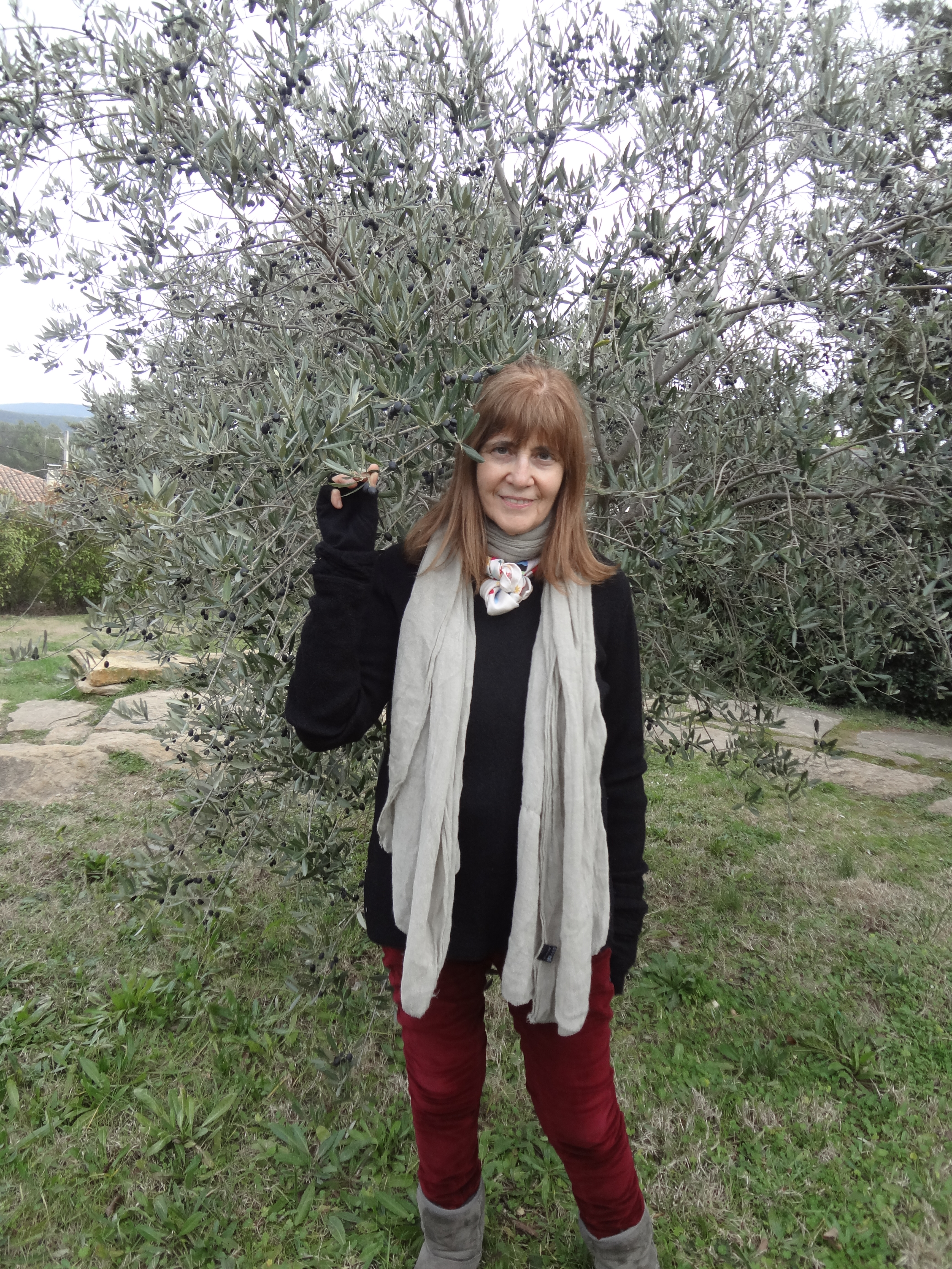 La escritora en el atelier de Cézanne en Enero de 2014